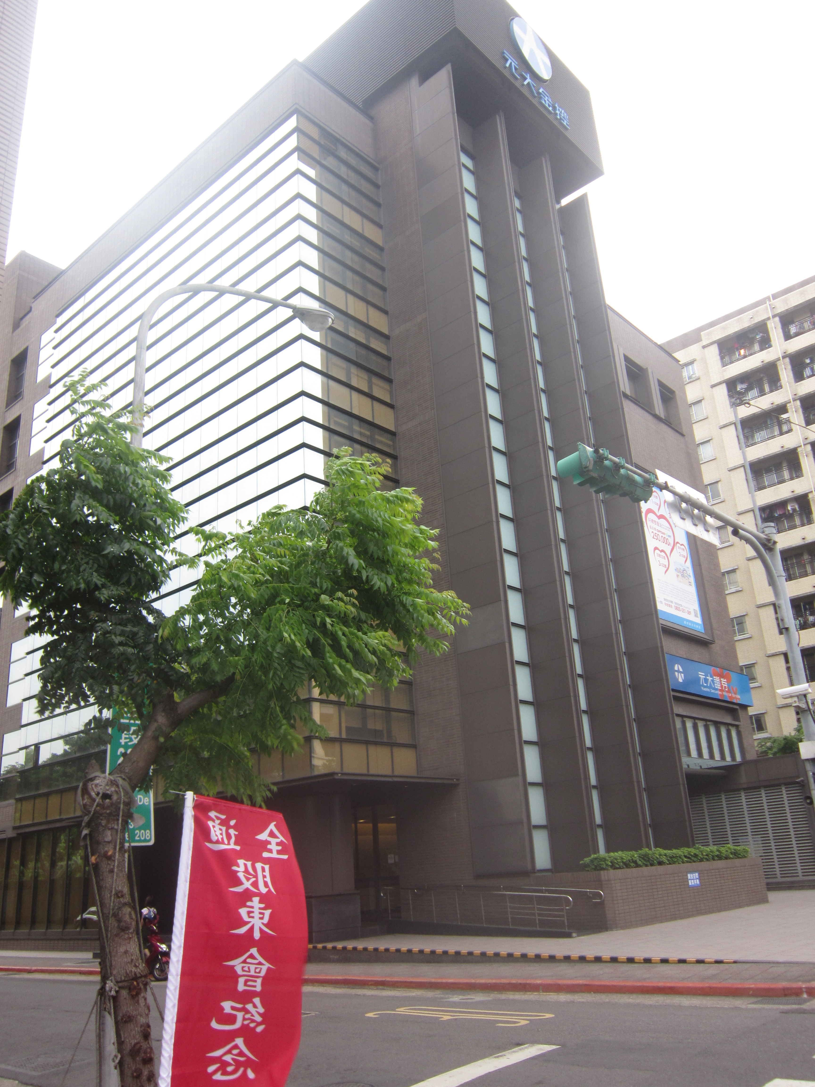 元大金控承德大樓，地址：臺北市大同區承德路三段210號。元大商業銀行承德分行與元大證券承德分公司均設於此。